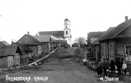 Беларуская (тарашкевіца): Ушачы (Ušačy), вуліца Далецкая (vulica Daleckaja)